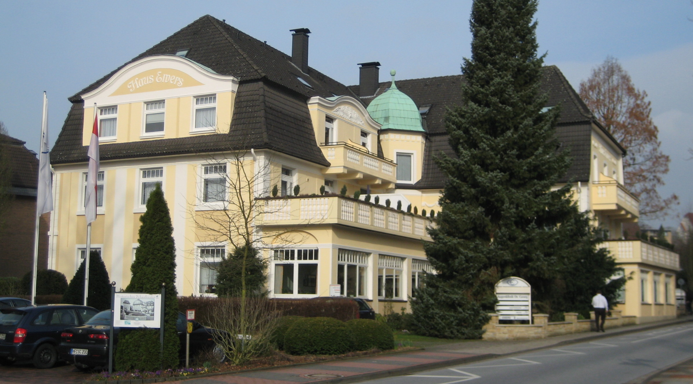 Im 1905 gebauten Haus Evers in Bad Rothenfelde befindet sich die 1960 gegründete „Augenklinik Dr. Georg“. Das Haus mit wechselhafter Geschichte diente auch als Reservelazarett und Hotelpension.